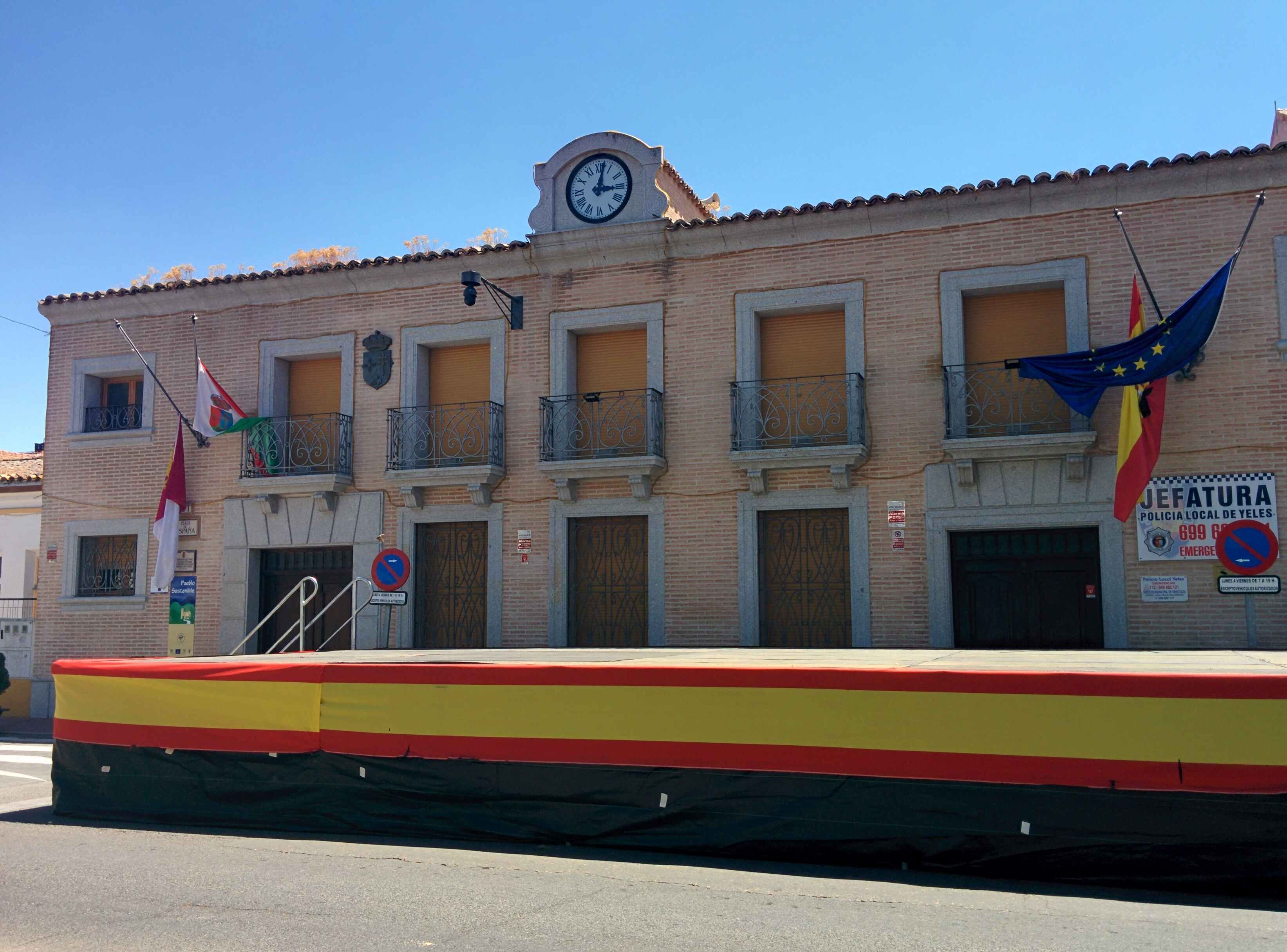 Casa consistorial de Yeles (Toledo, España).